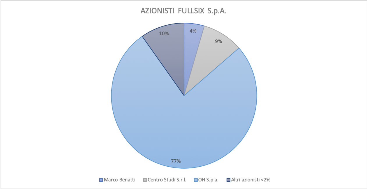 tabella azionisti aggiornata